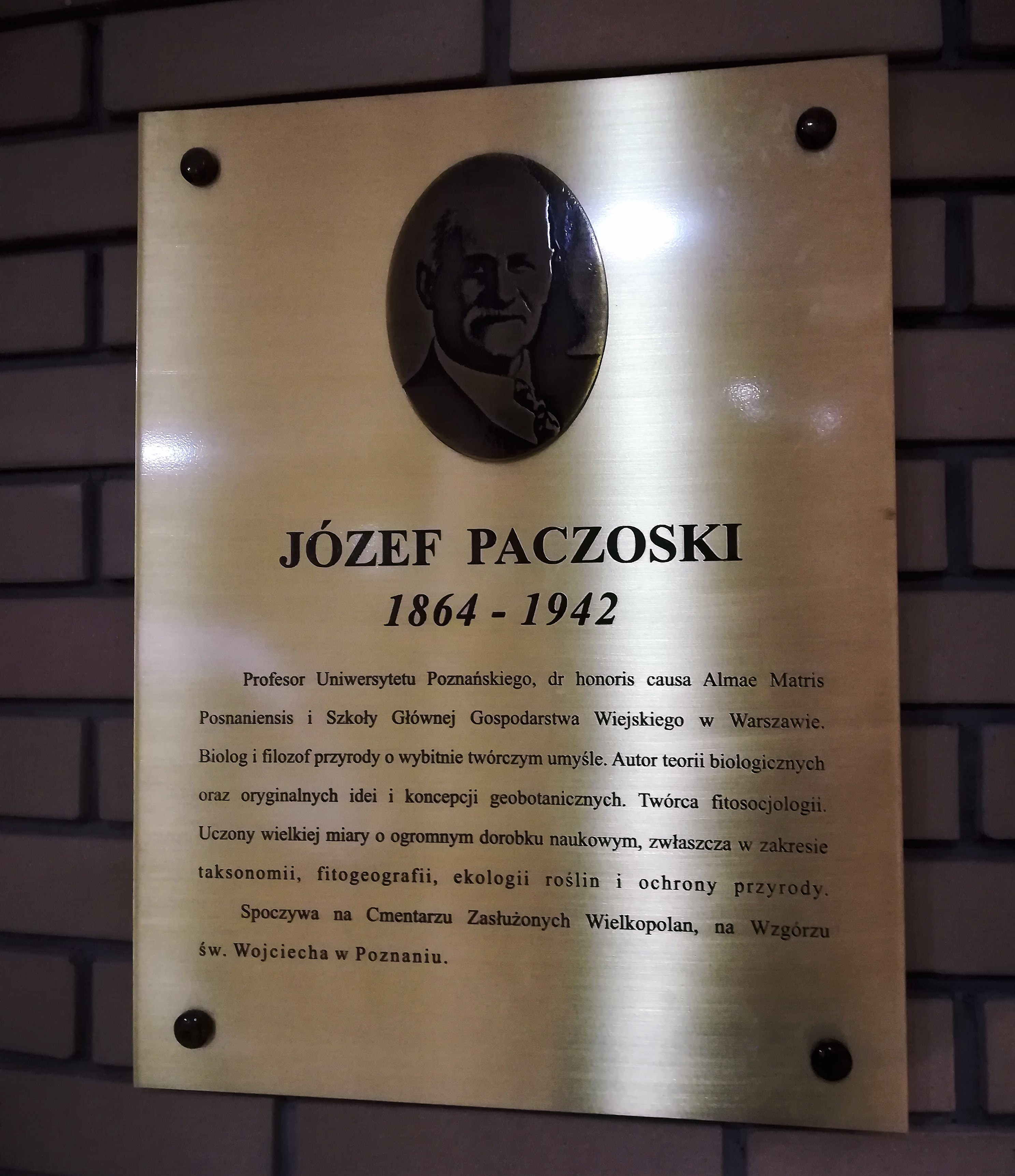 Collegium Biologicum na Kampusie Morasko w Poznaniu - tablica Paczoskiego.